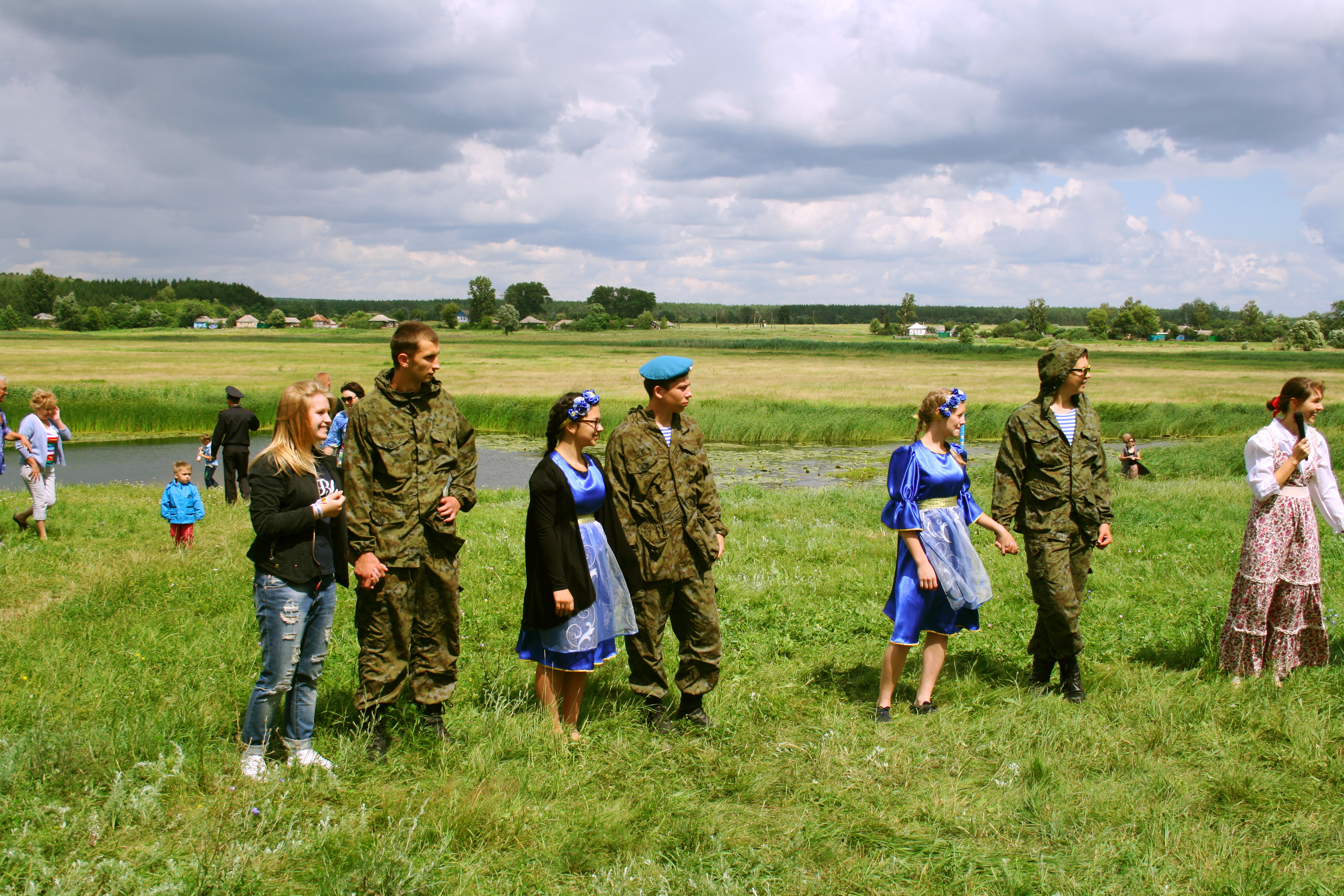 Фестиваль «Хомутчанская долина мастеров» 2015. Село Самарино Ивнянского района Белгородской области.